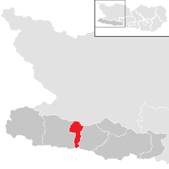 Bezirk Hermagor